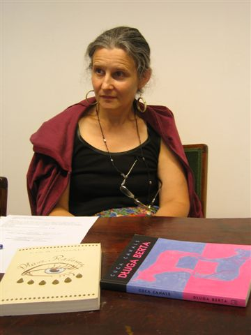 Joanna Skórnicka (b. 1956), Polish translator